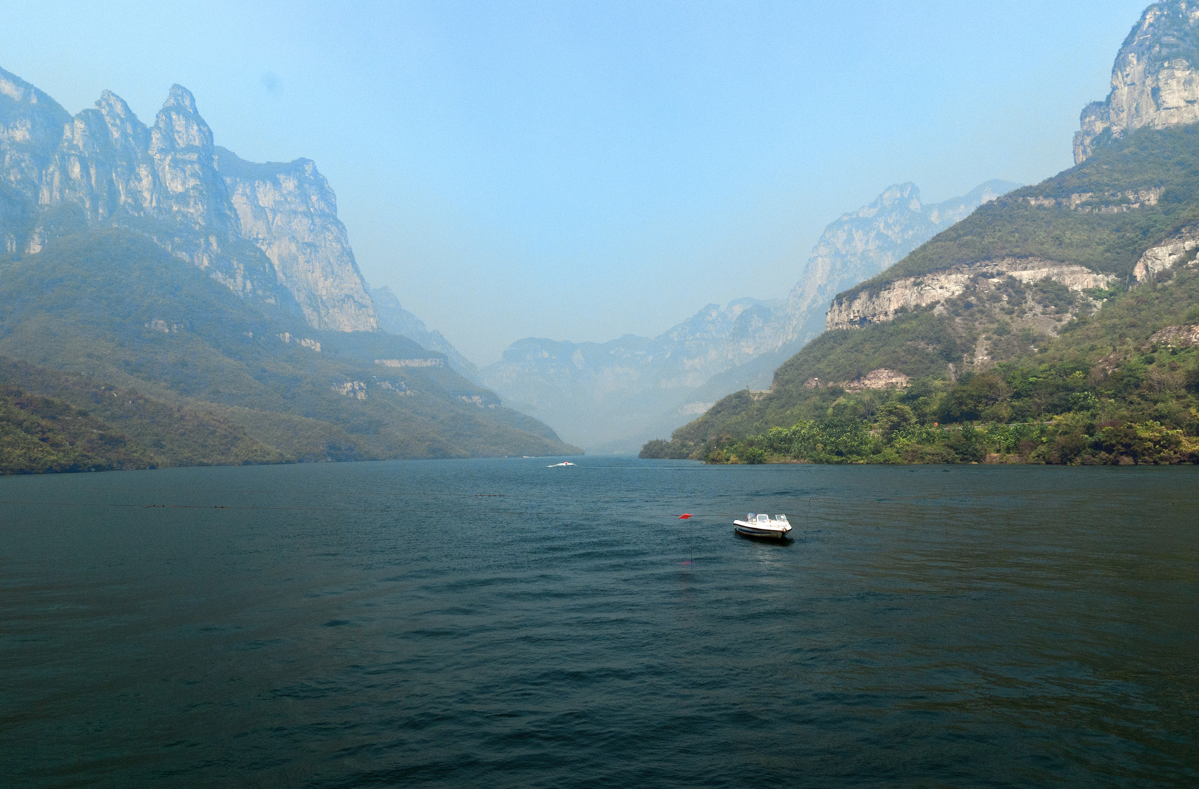 子房湖